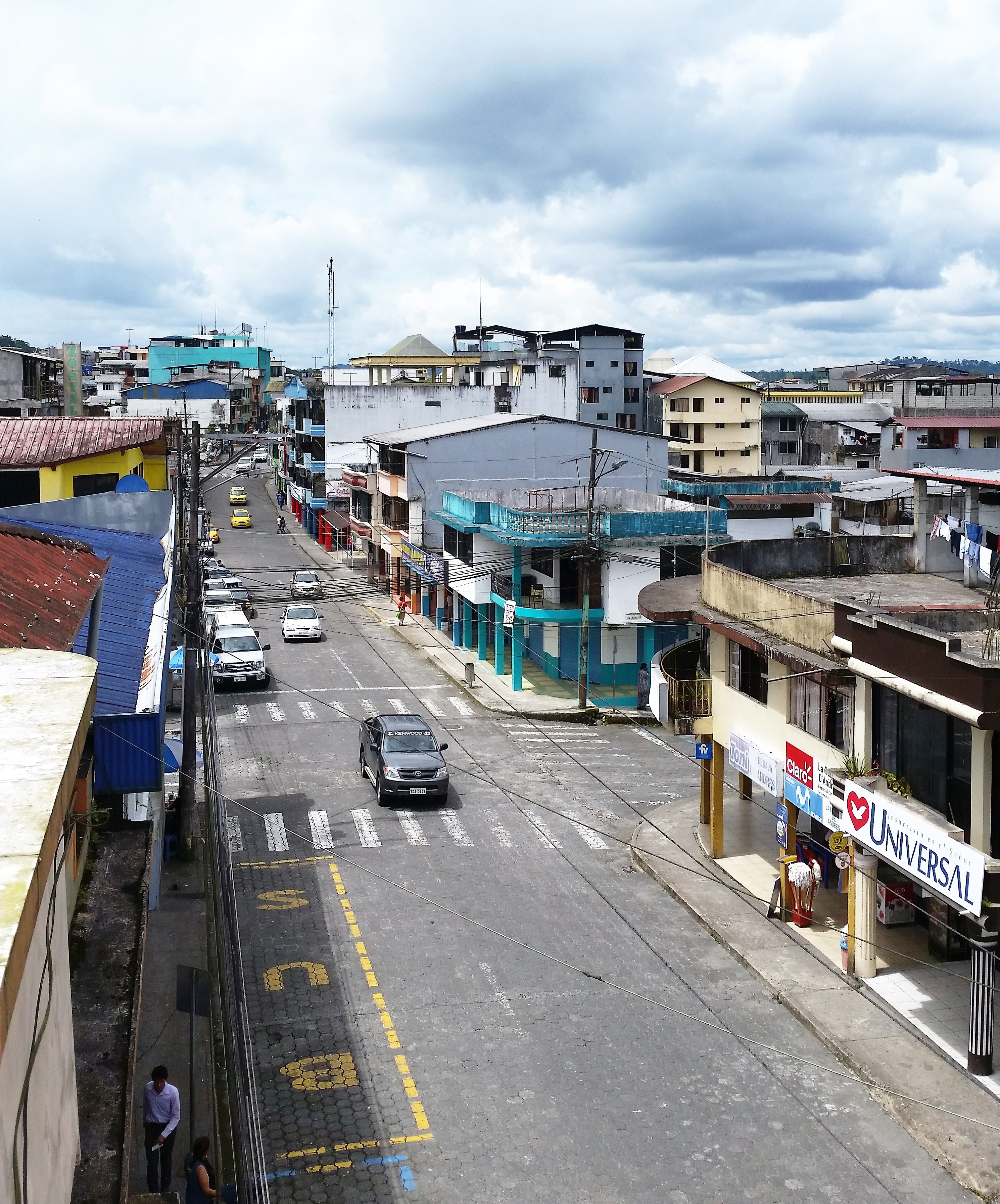 Calle Francisco. de Orellana en el barrio Libertad, Puyo